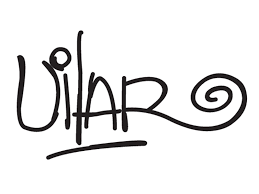 Firma